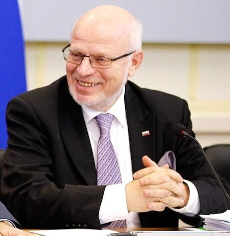 Перед началом заседания Совета по развитию гражданского общества и правам человека. С советником Президента (председателем Совета) Михаилом Федотовым